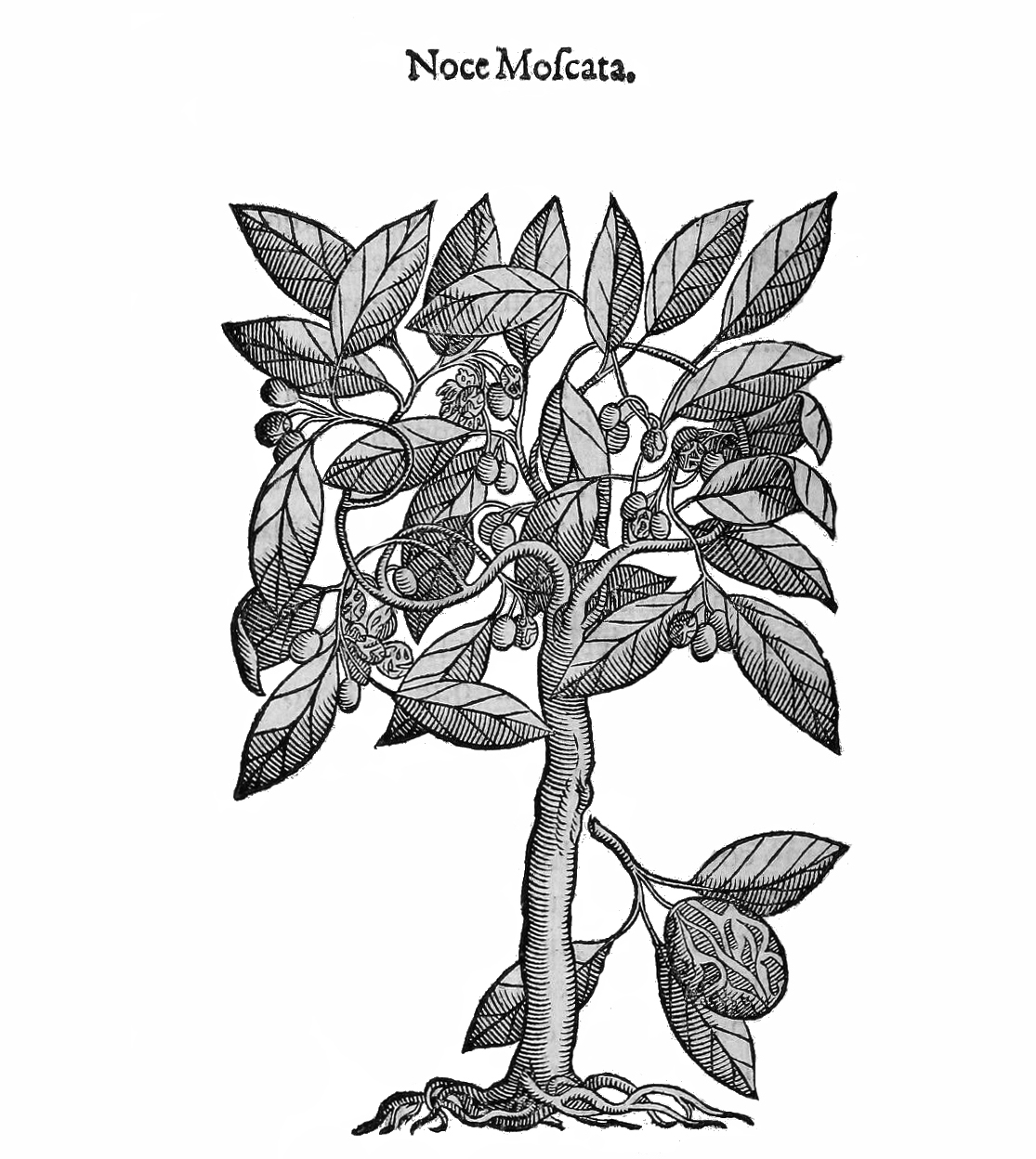 Myristica fragrans